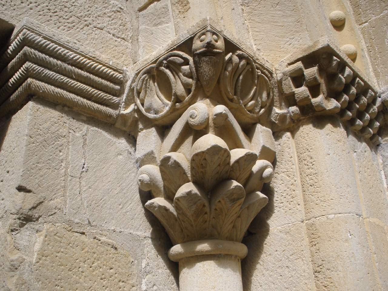 Ermita de San Adrián de Vadoluengo (Sangüesa, Navarra)